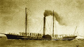 Das 1818 erbaute, erste Dampfschiff des Königreichs Neapel (und zugleich erstes italienisches): Ferdinando Primo